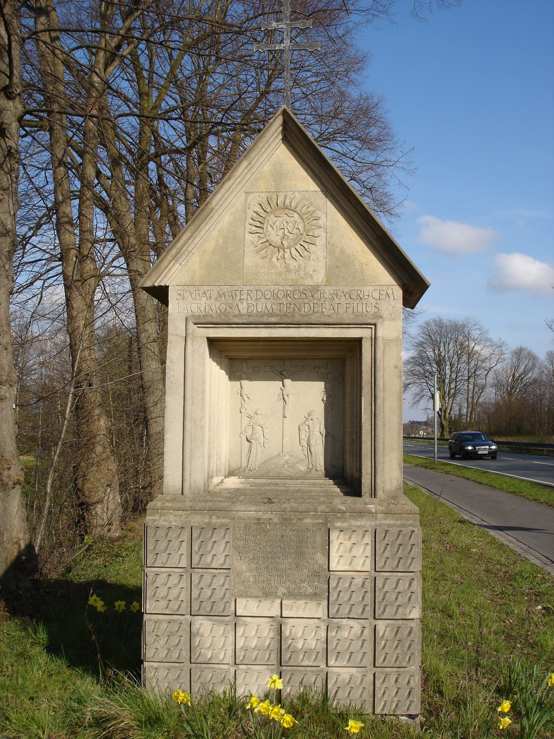 Historische Telgter Wallfahrt von Münster nach Telgte Station 5 - Schmerz